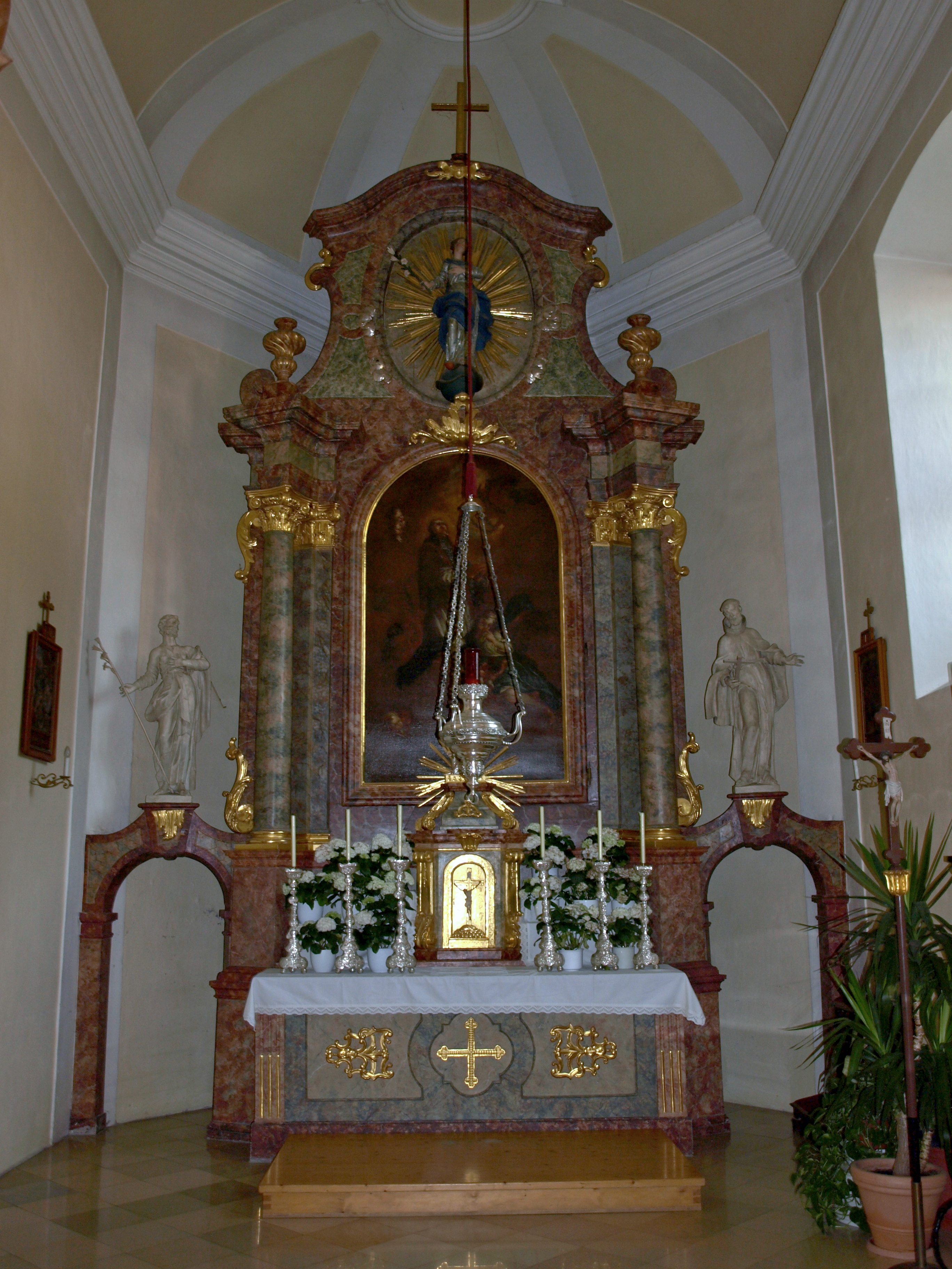 Kath. Pfarrkirche hl. Johann Nepomuk und Kriegerdenkmal